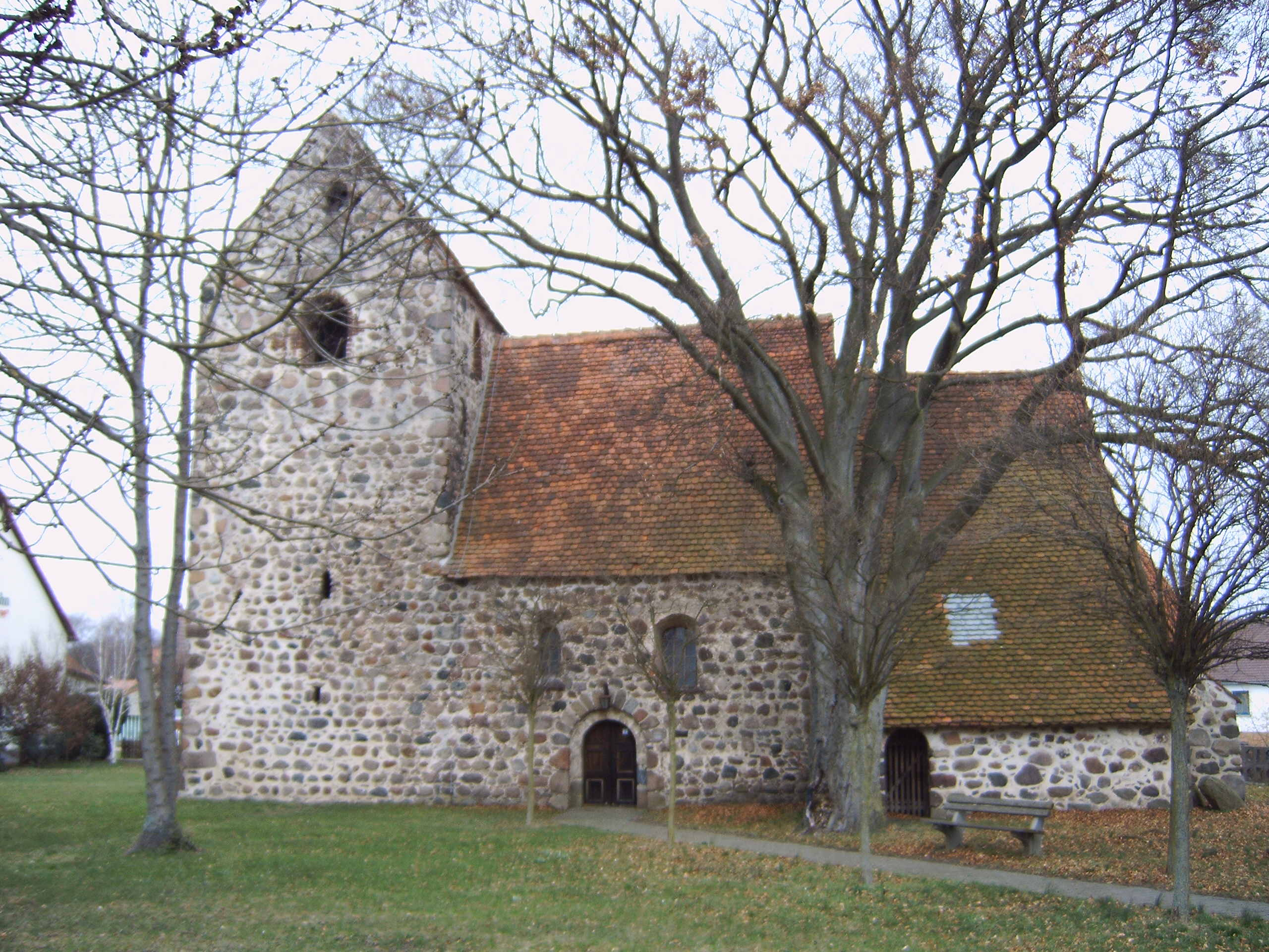 Sankt-Sebastian-Kirche in Mahlsdorf, Stadt Salzwedel